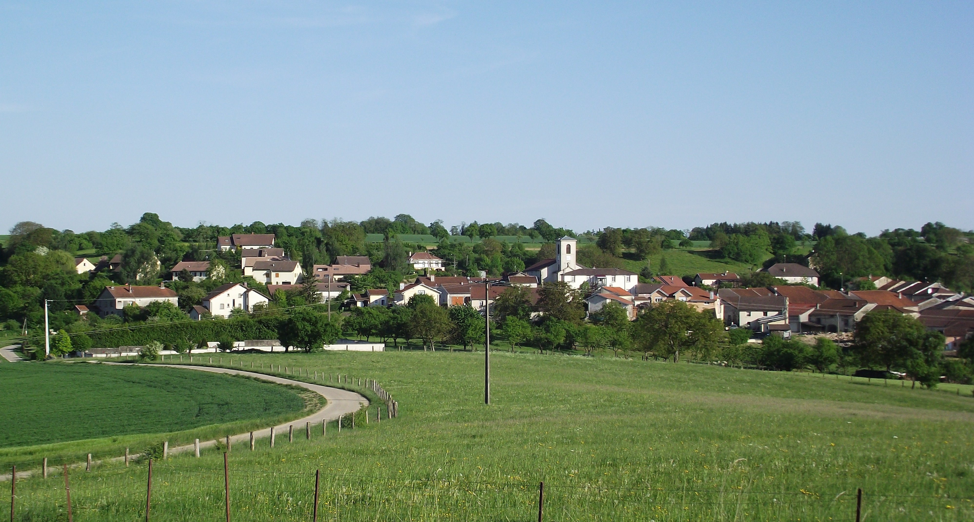 Le Haut du village